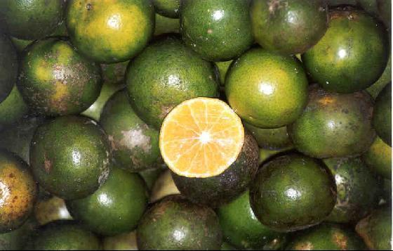 Serian's Market